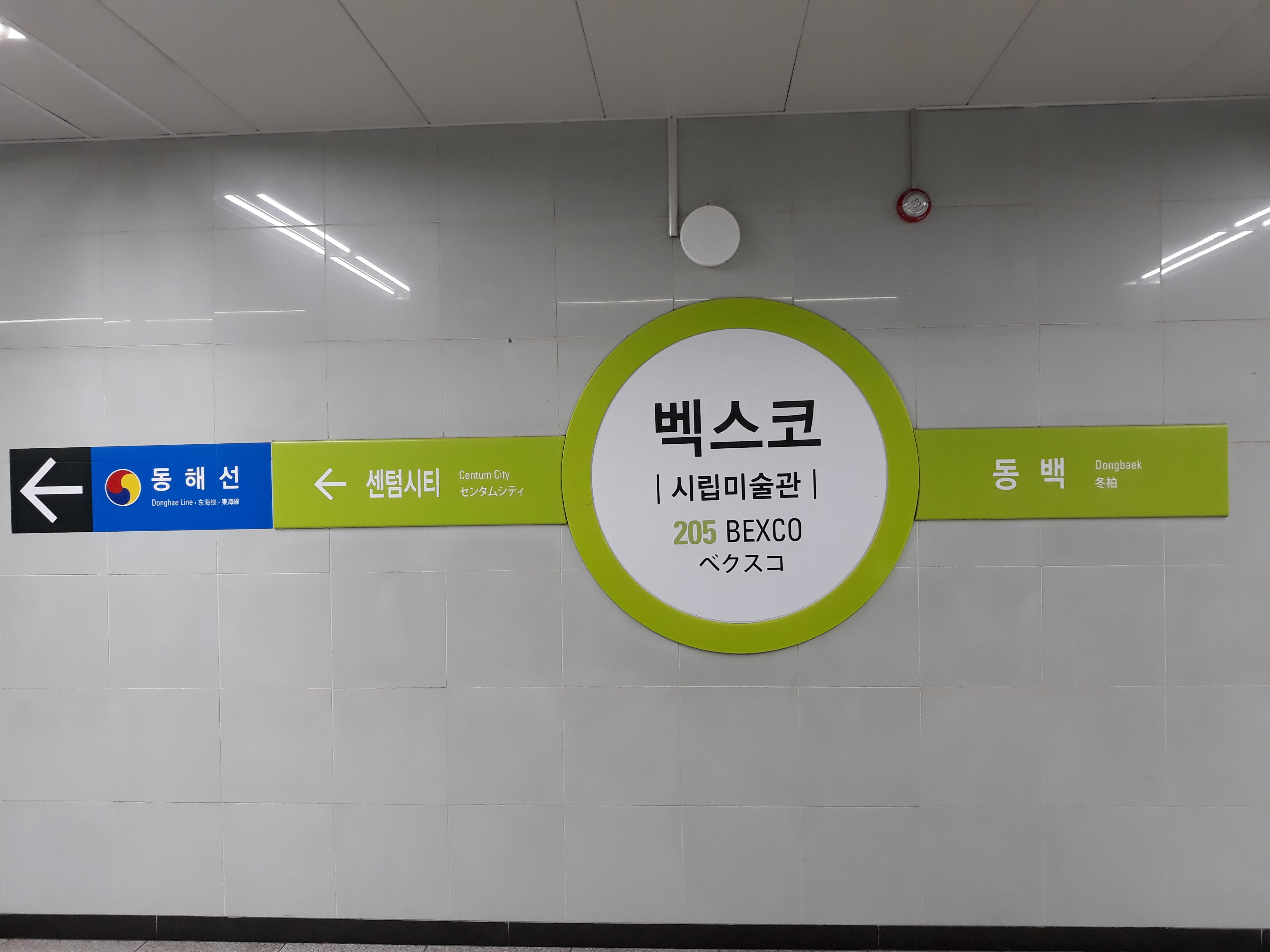 부산 도시철도 2호선 벡스코역 양산 방면 역명판